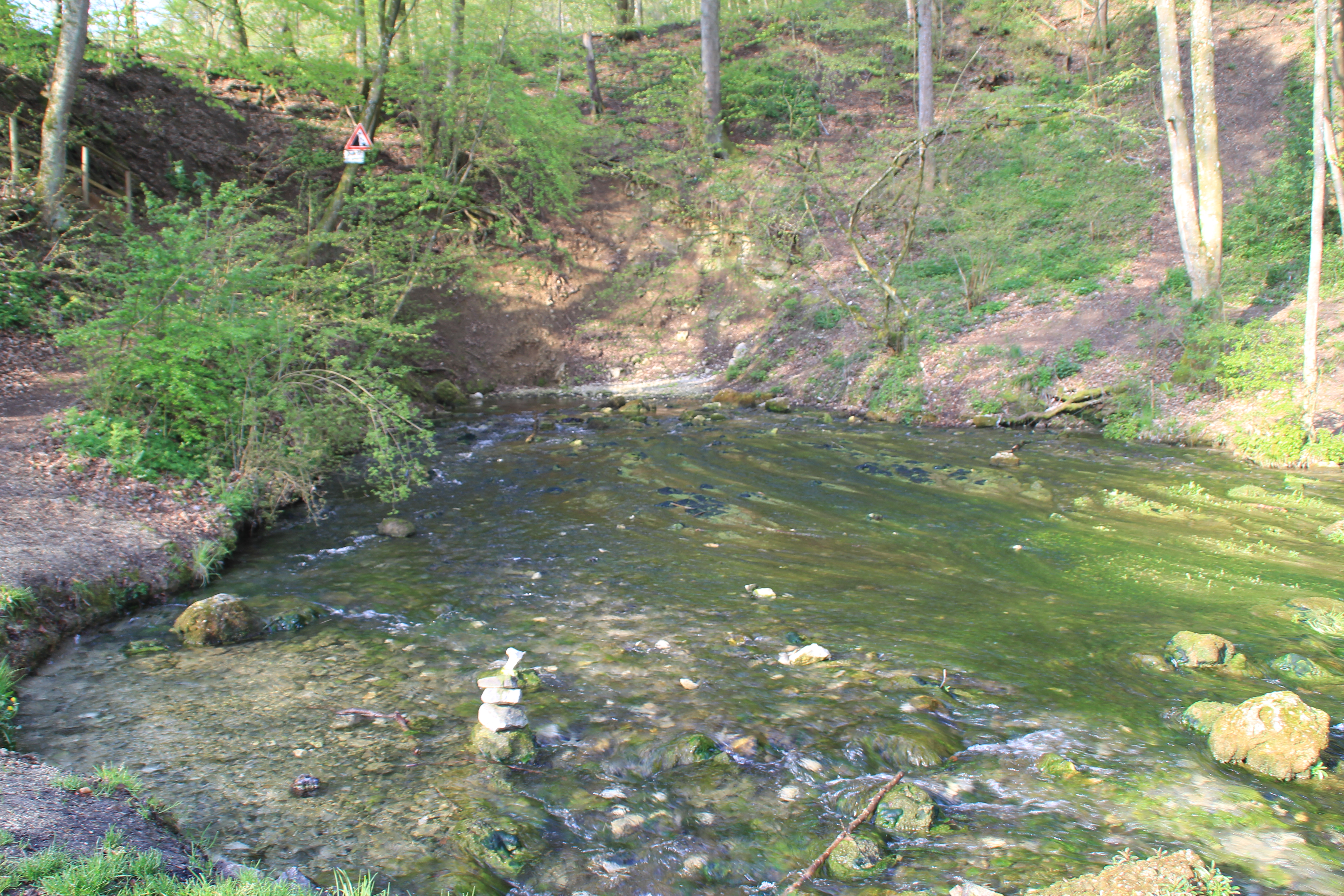 Der Kocherursprung bei Oberkochen